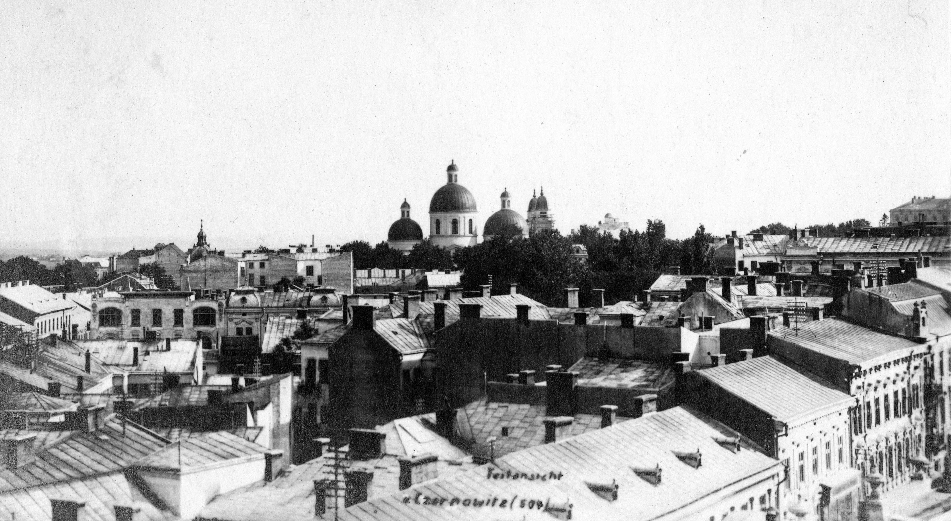 a város látképe, háttérben a Szentlélek ortodox székesegyház kupolái. Location: Ukraine, Chernivtsi Tags: picture, roof, church Title: a város látképe, háttérben a Szentlélek ortodox székesegyház kupolái.